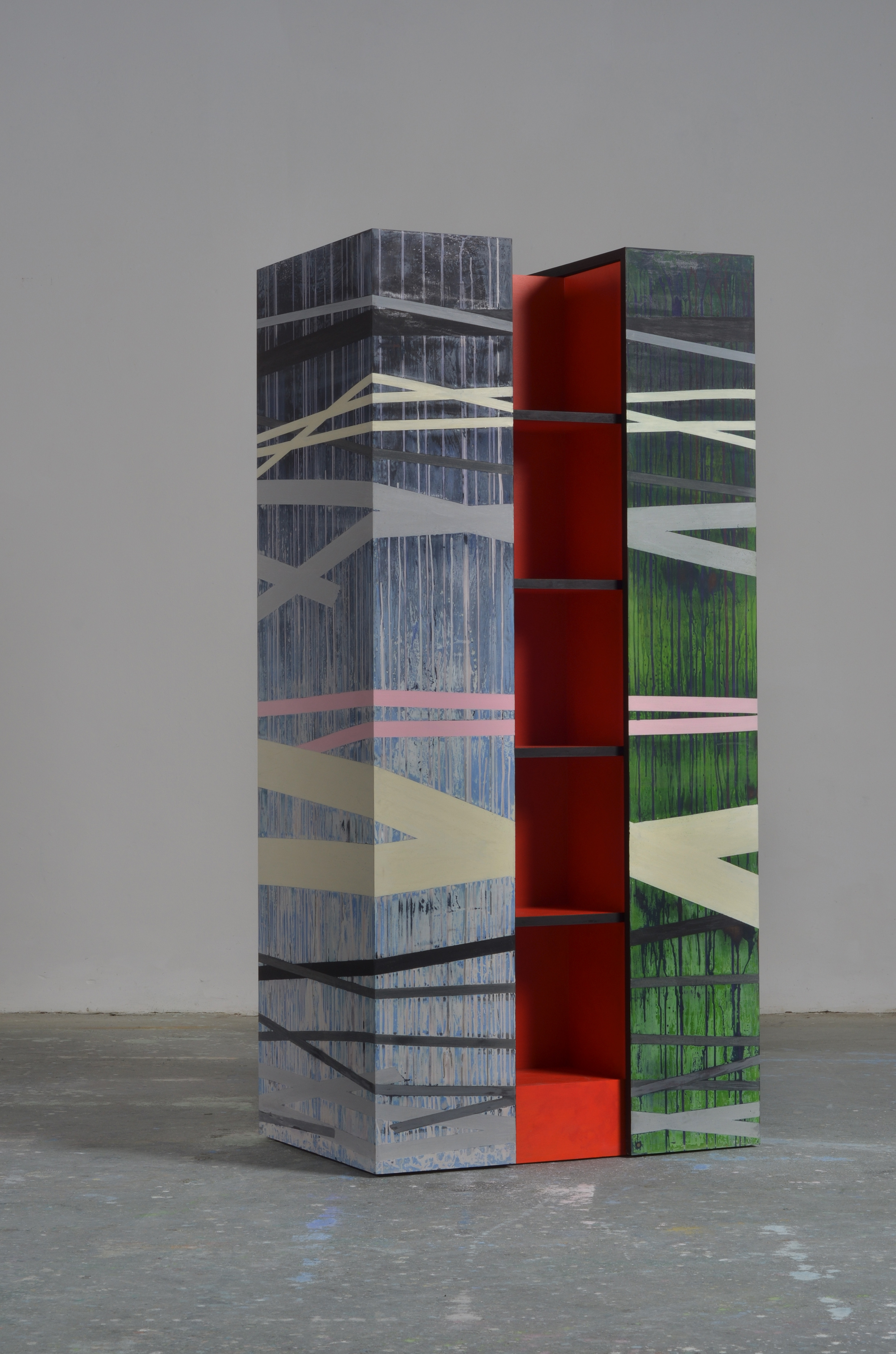 einzelbild